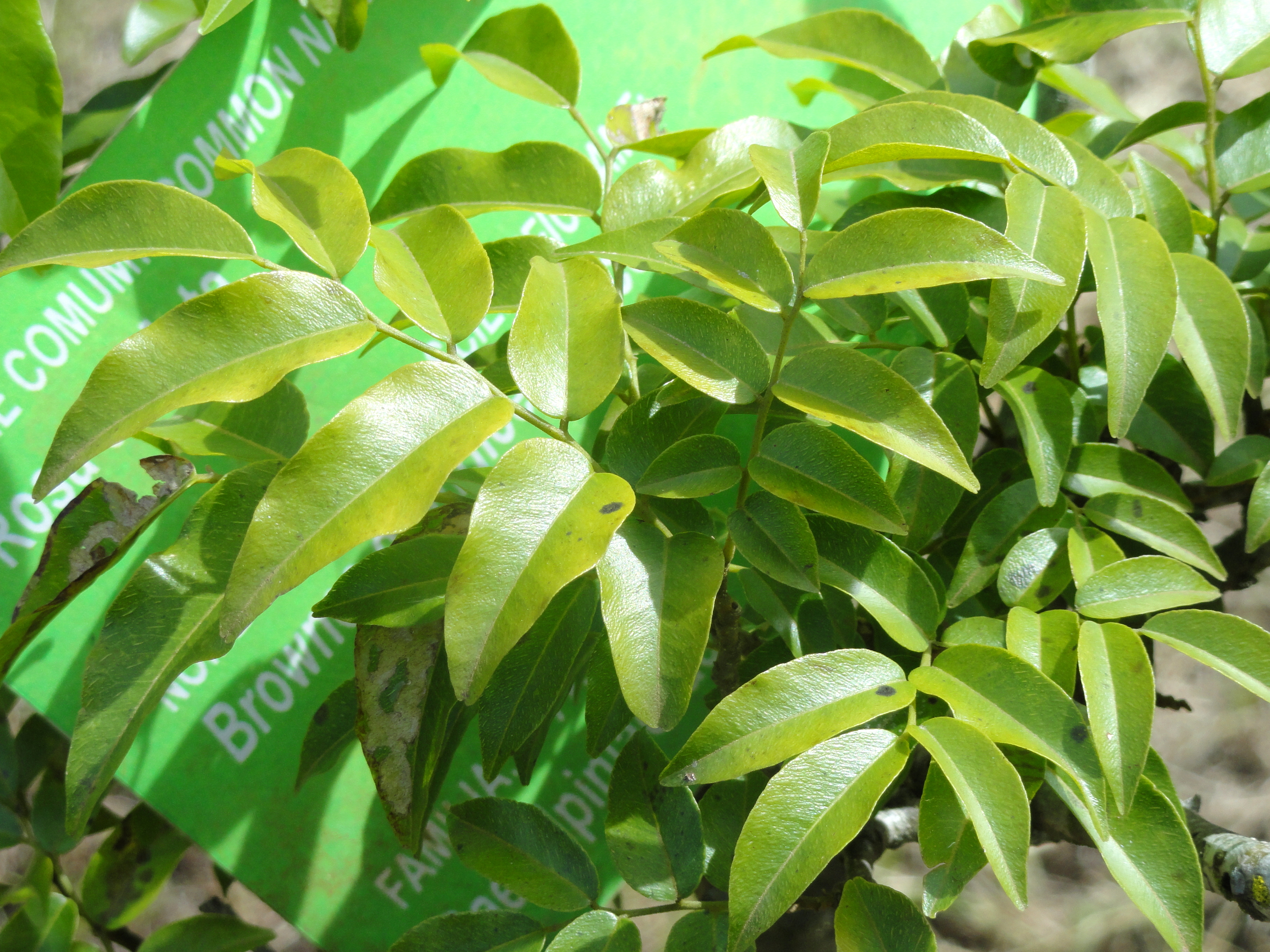 Botanical specimen in the Jardim Botânico de Brasília, Brasília, Brazil.